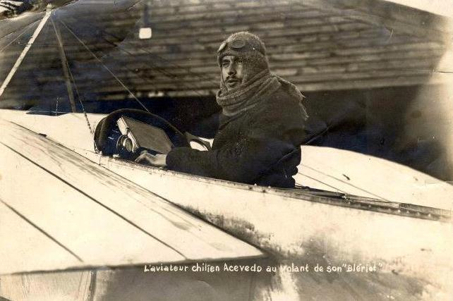 El Aviador chileno Luis Acevedo.